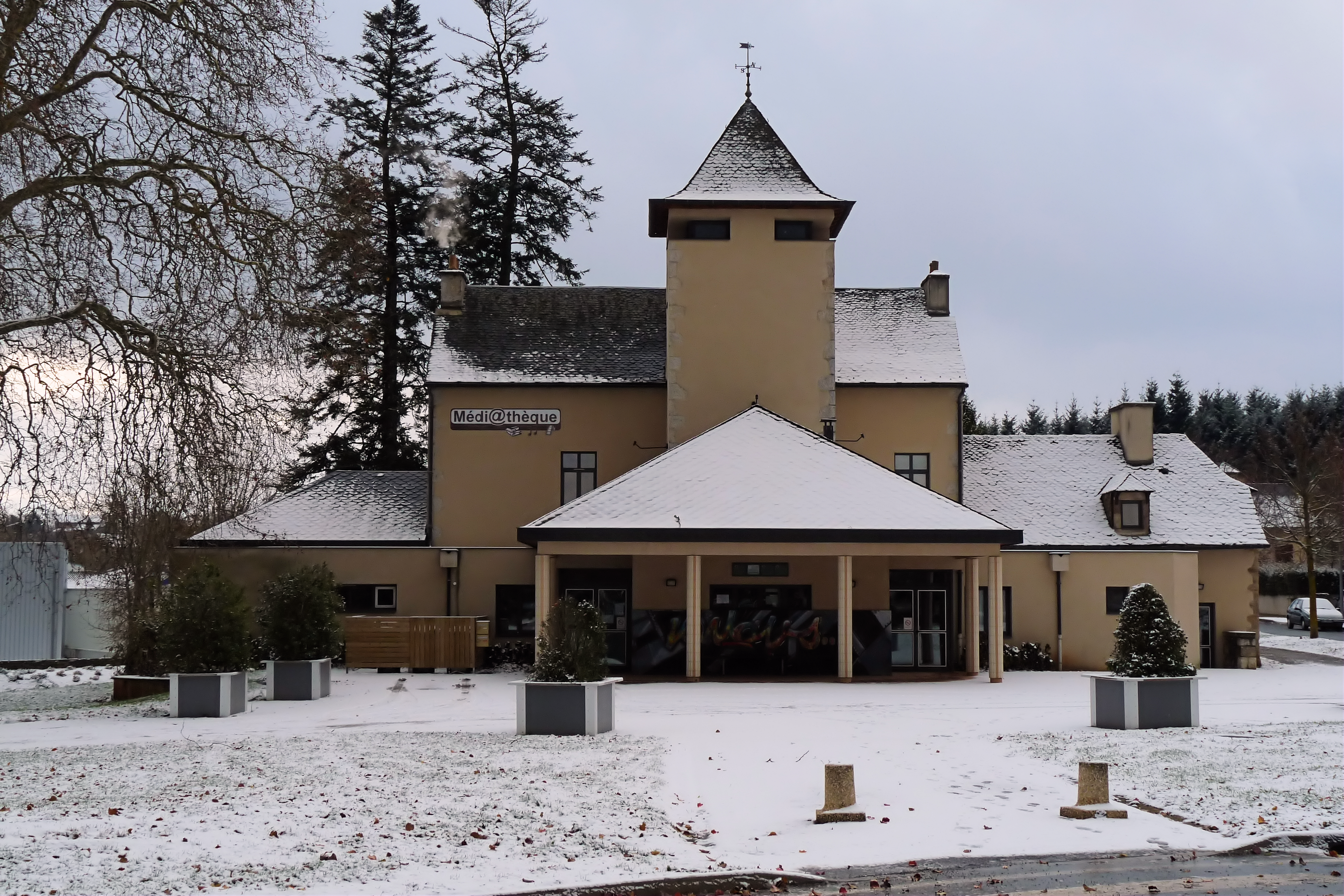 Olemps: Le Manoir sous la neige